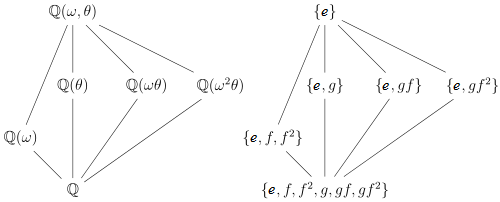 A quasi-copy of the file "Lattice diagram of Q adjoin a cube root of 2 and a primitive cube root of 1, its subfields, and Galois groups" for the use in . Letters in the diagram changed to suit the main text.